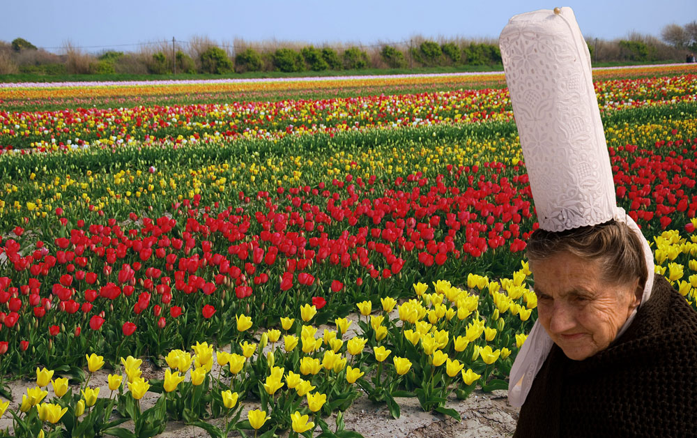 Maria Lambour et sa célèbre coiffe, devant des champs de tulipes à La Torche (Plomeur, Finistère).